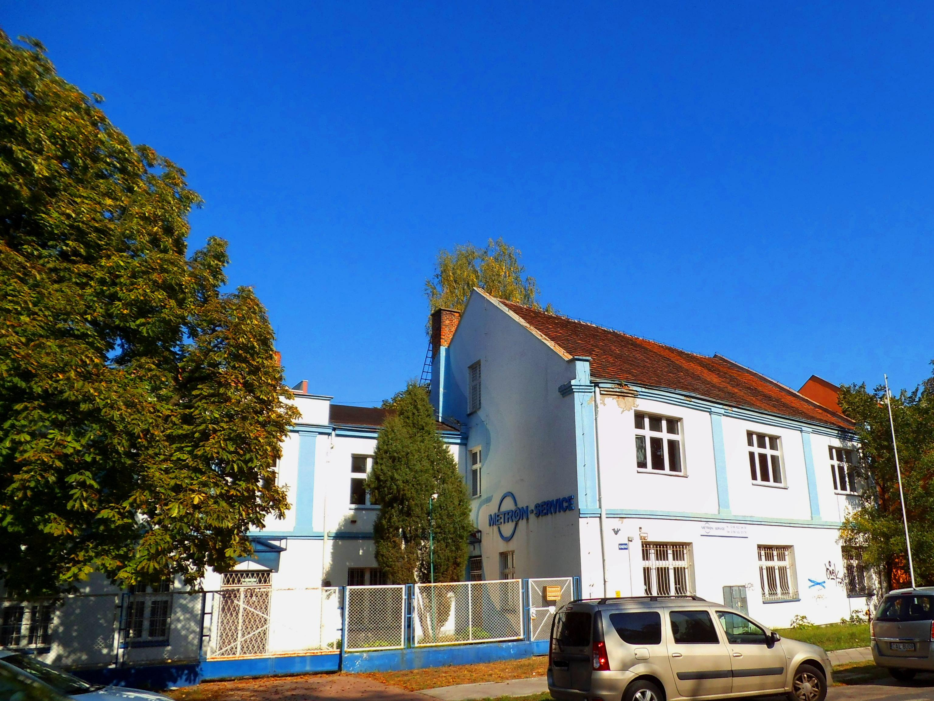 Była siedziba sklepu firmowego Metrony przy ul. Bydgoskiej w Toruniu